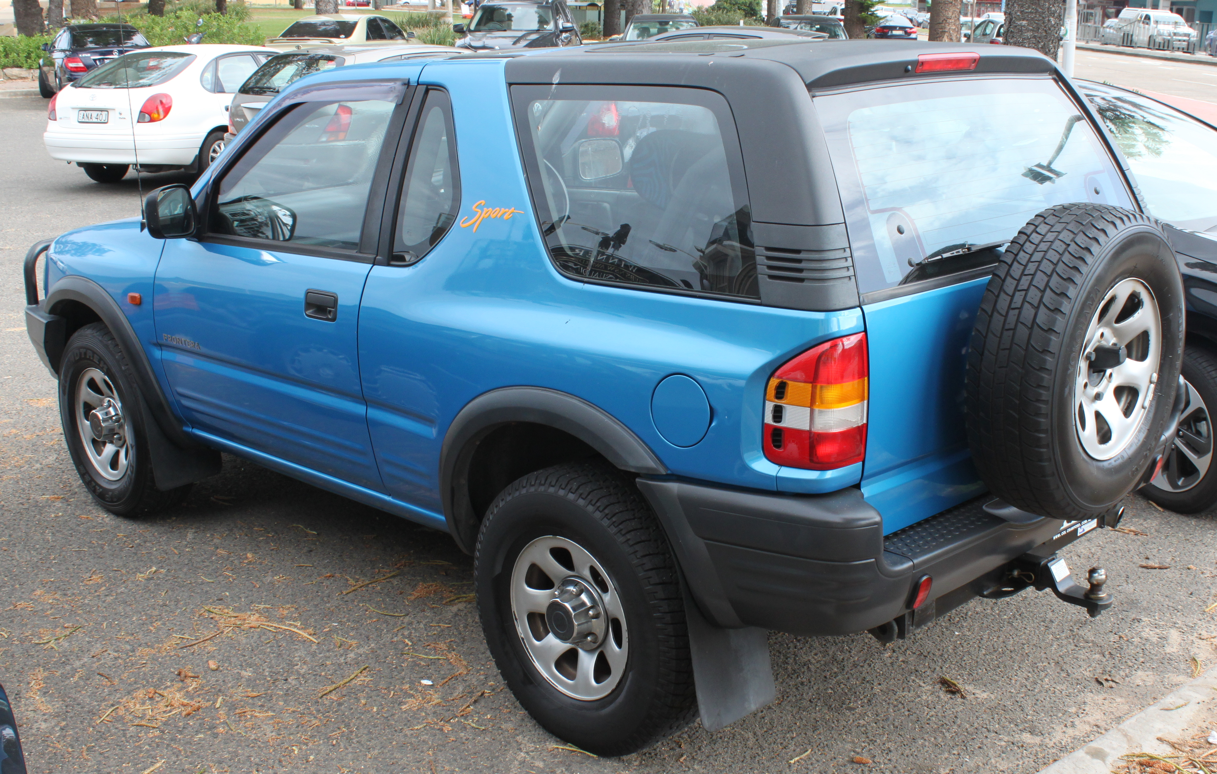 Holden Frontera UE Sport